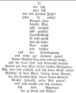 Стихотворение, набранное в форме державы, немецкого поэта XVII в. Гарсдерфера